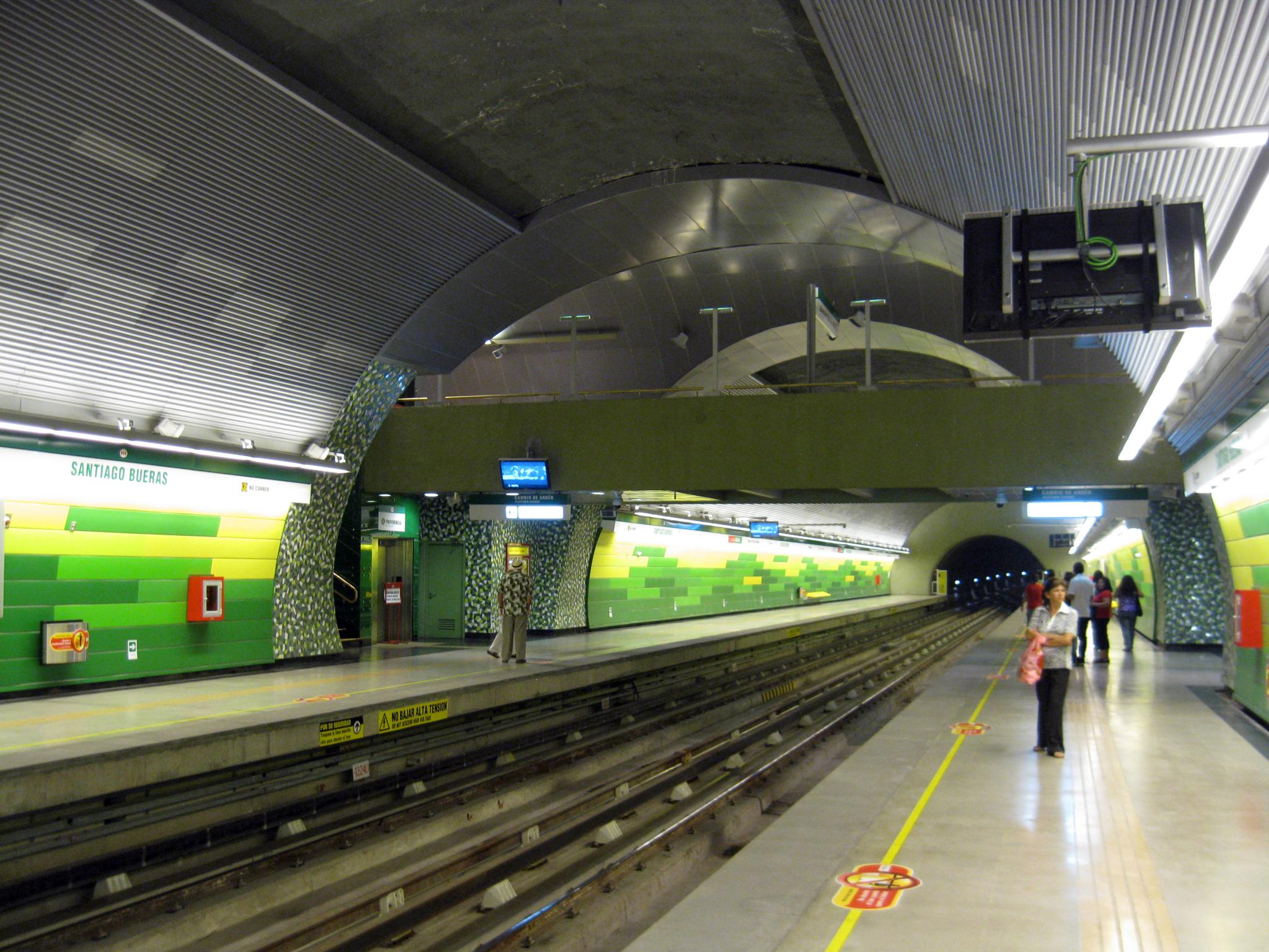 Extensión Poniente Línea 5: Febrero 2011